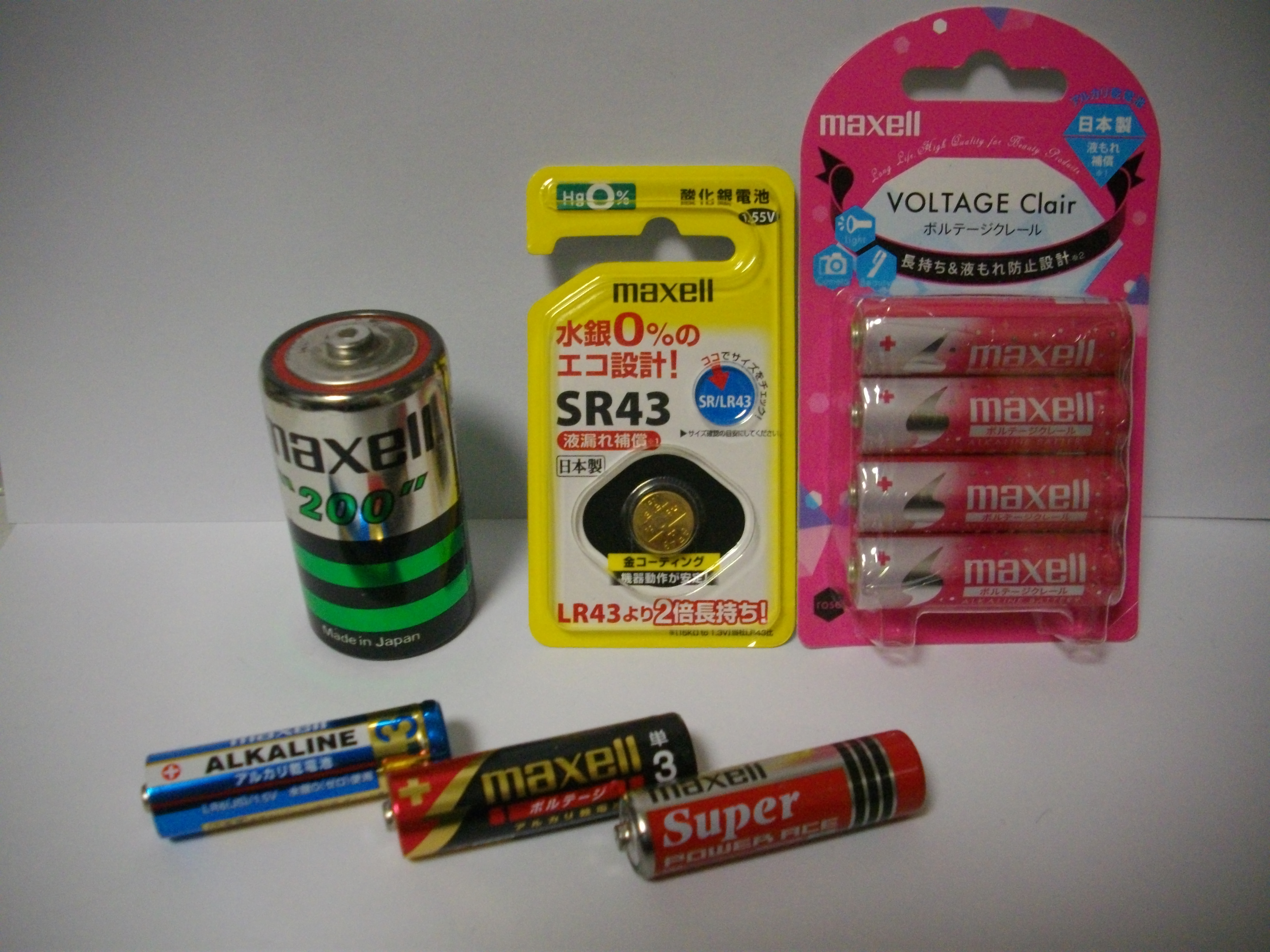 マクセル製の乾電池。